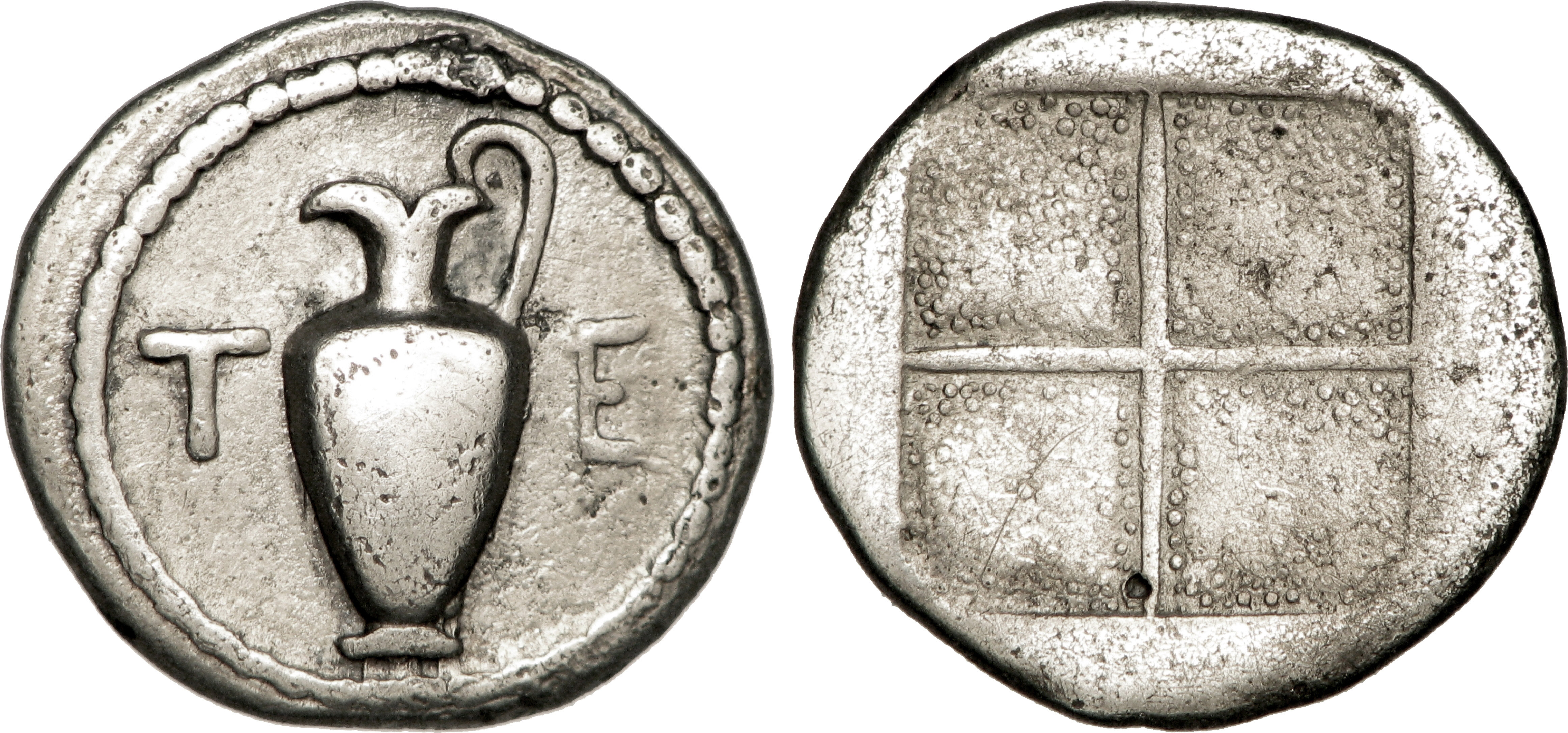 Nom de l'atelier : Macédoine, Terone Métal : argent Diamètre : 14,5mm Poids : 2,25g. Description avers : Oinochoé ; grènetis circulaire. Description revers : Carré creux quadripartite.